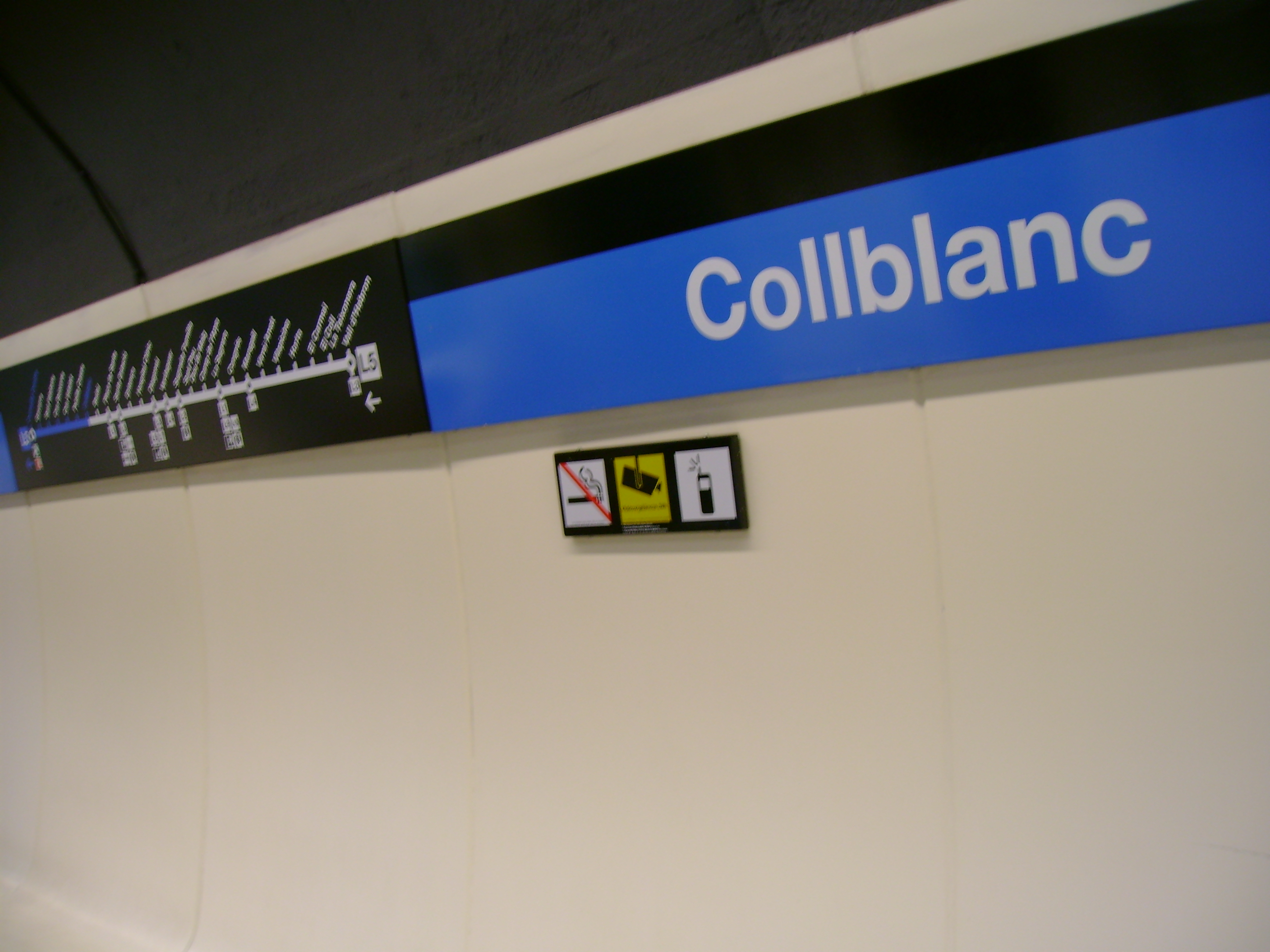 Foto capturada per la meva càmara a l'estació de Collblanc (Metro de Barcelona).